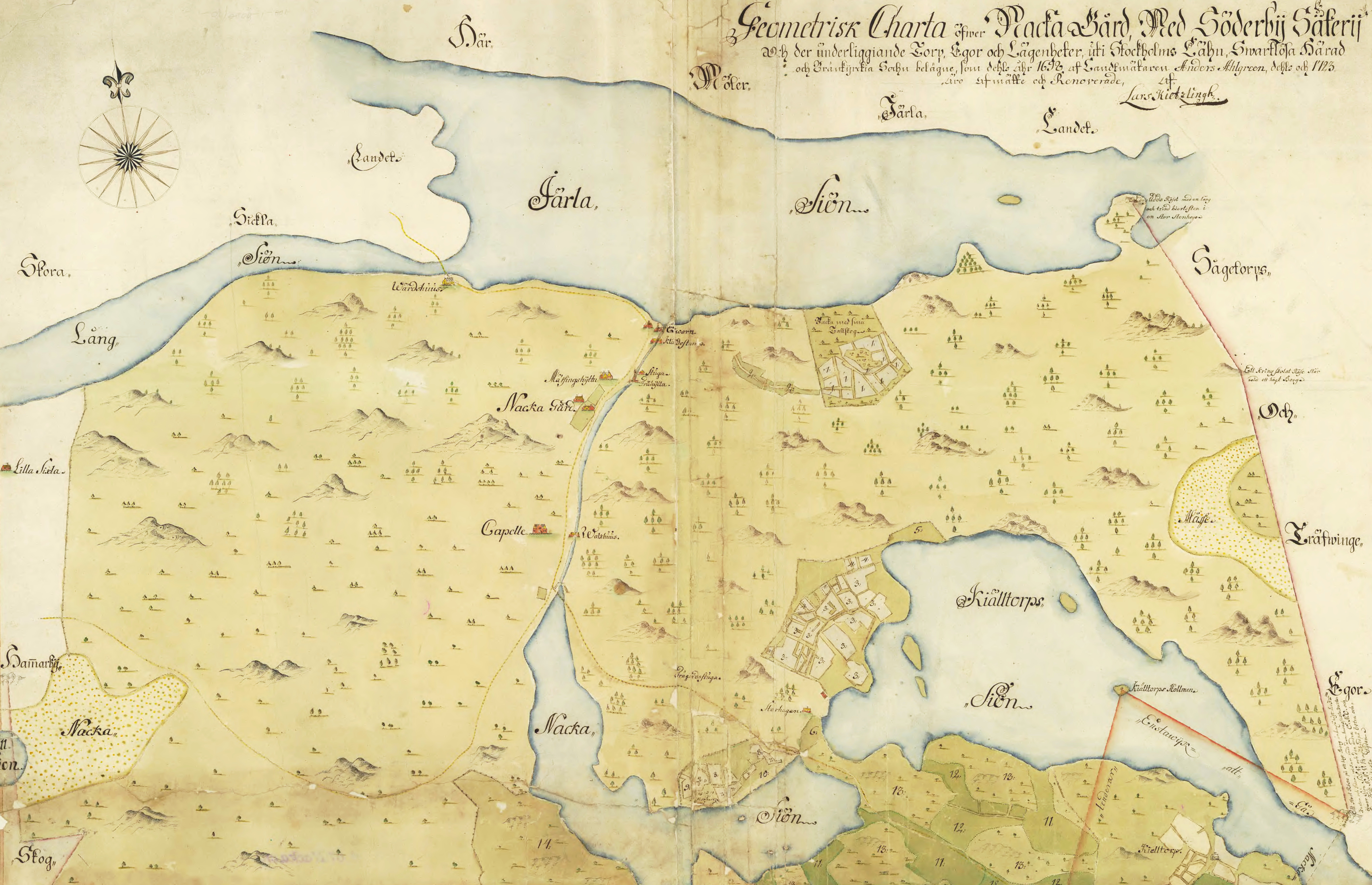 Karta över Nacka gård med Järlasjön och Källtorpssjön 1698 reviderad 1723